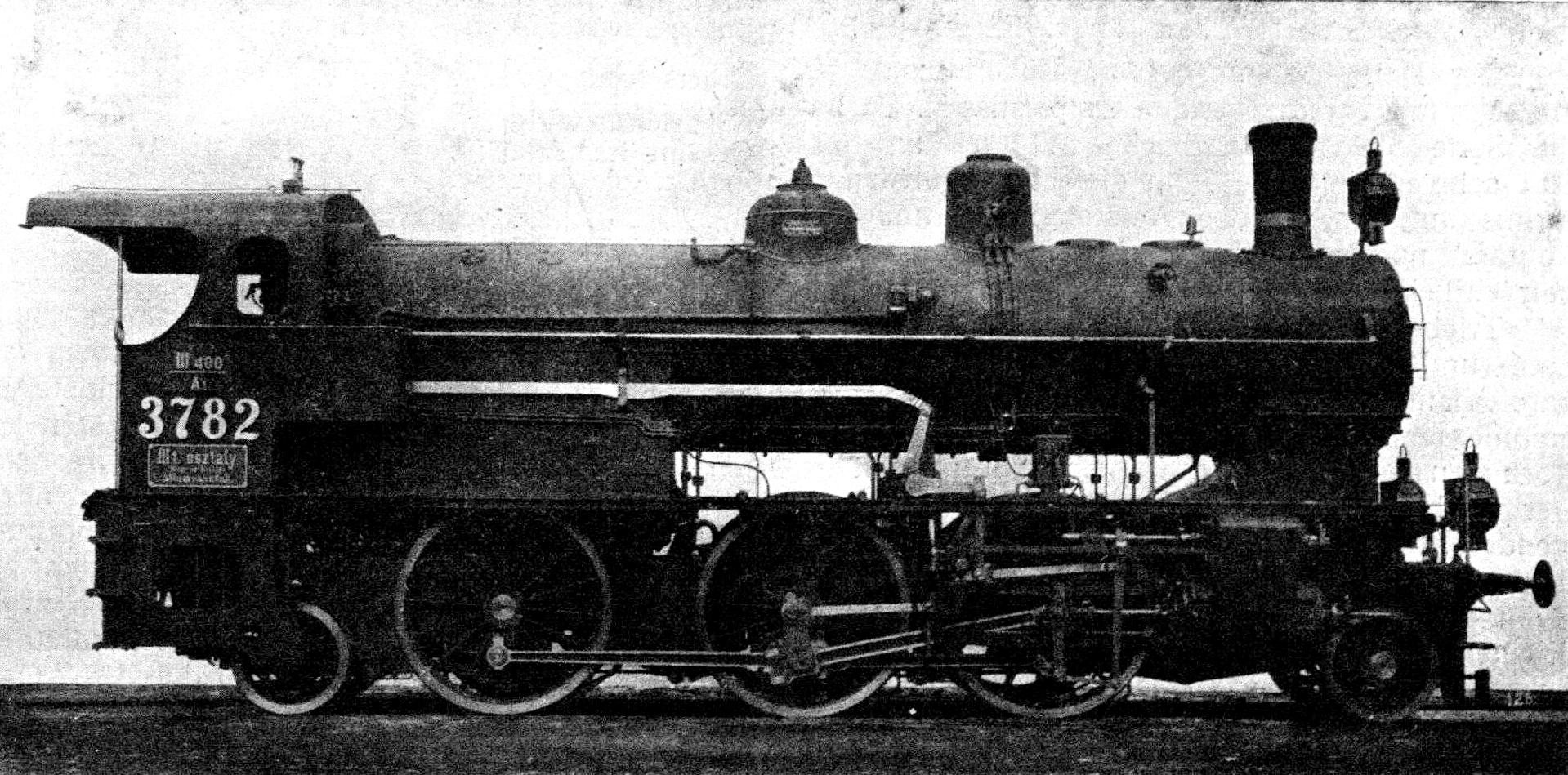 A MÁV IIIt. osztályú személyvonati mozdonya